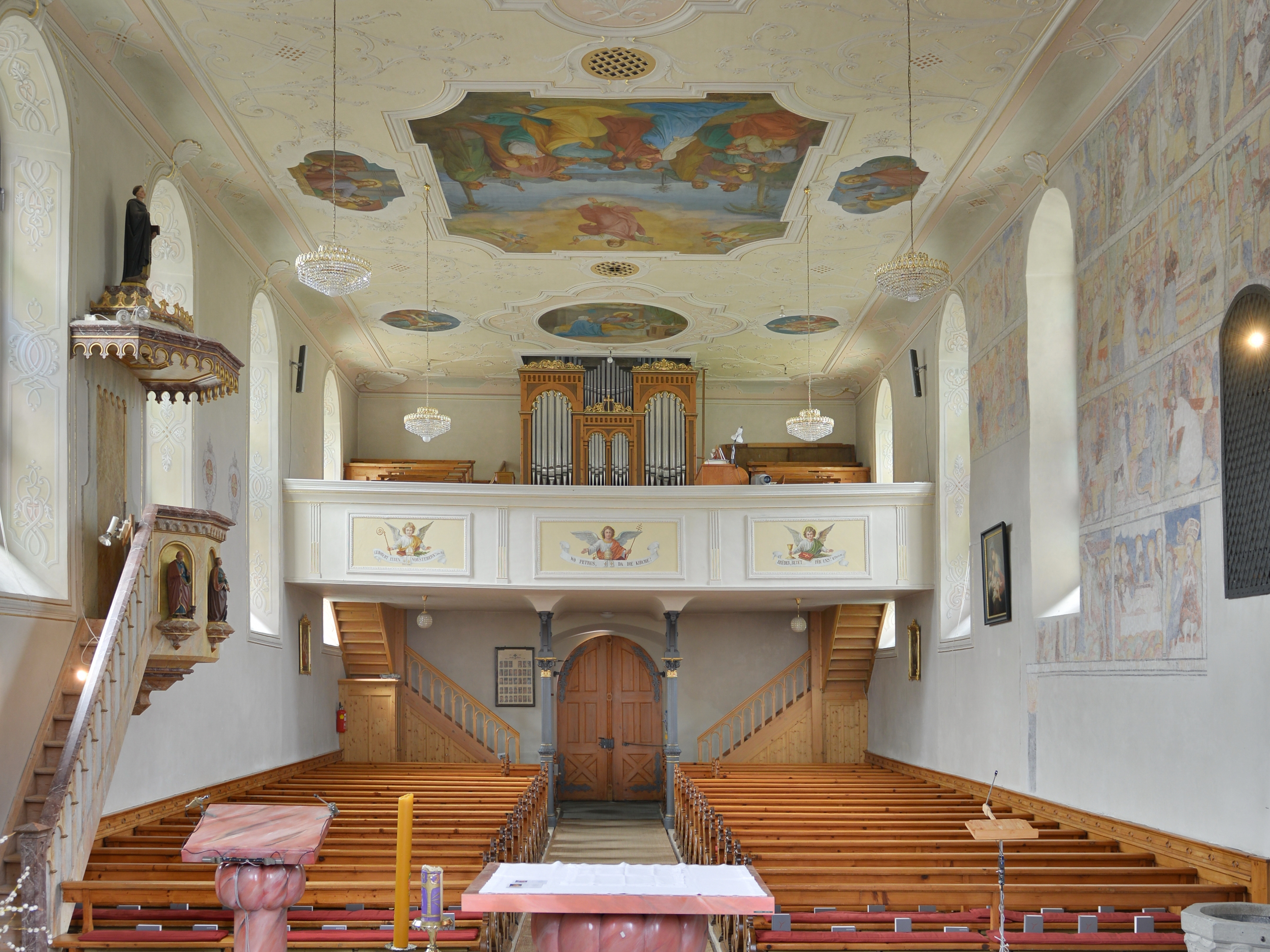 Katholische Pfarrkirche St. Jodok in Mittelberg, Kleinwalsertal.